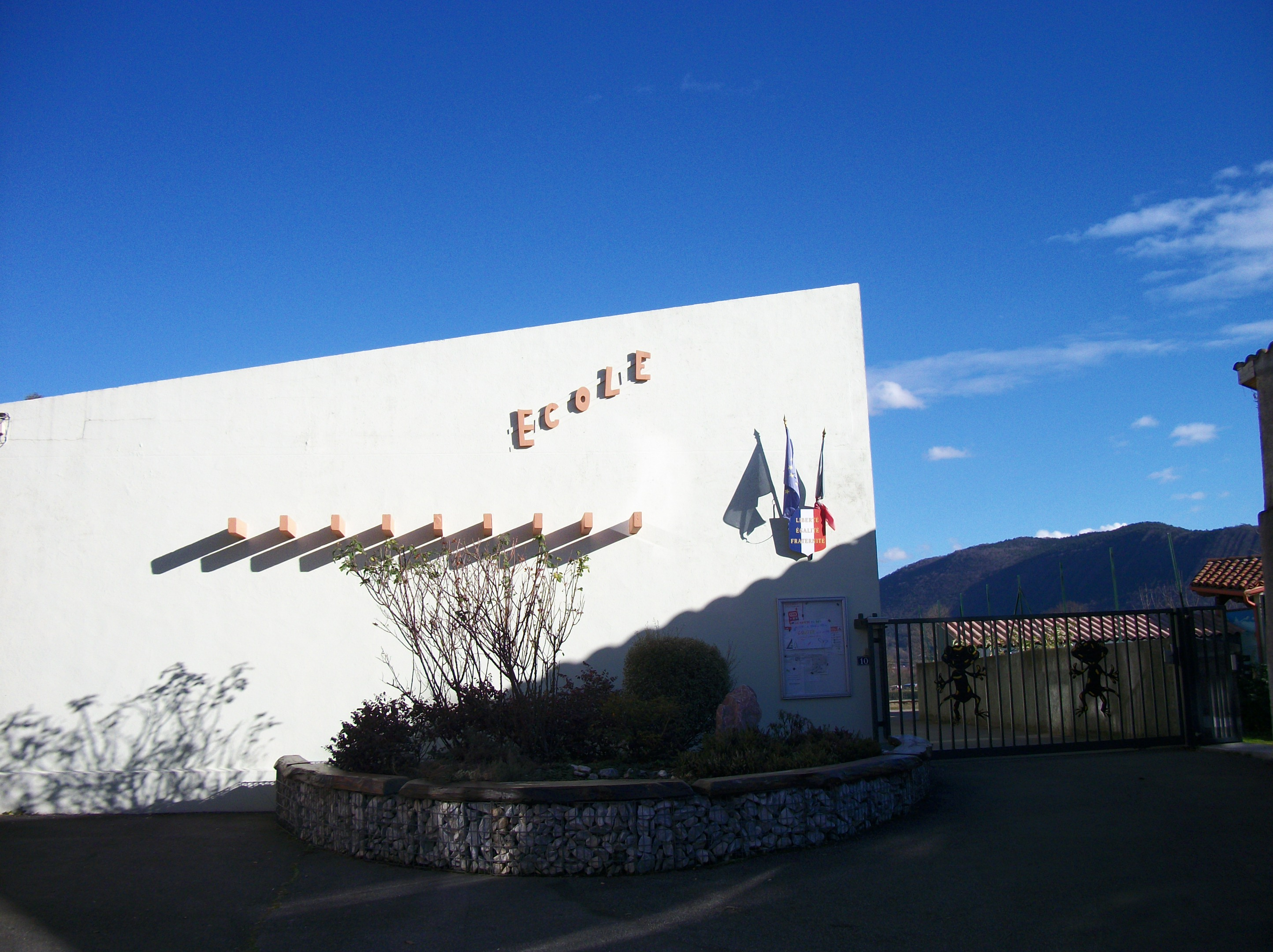 École